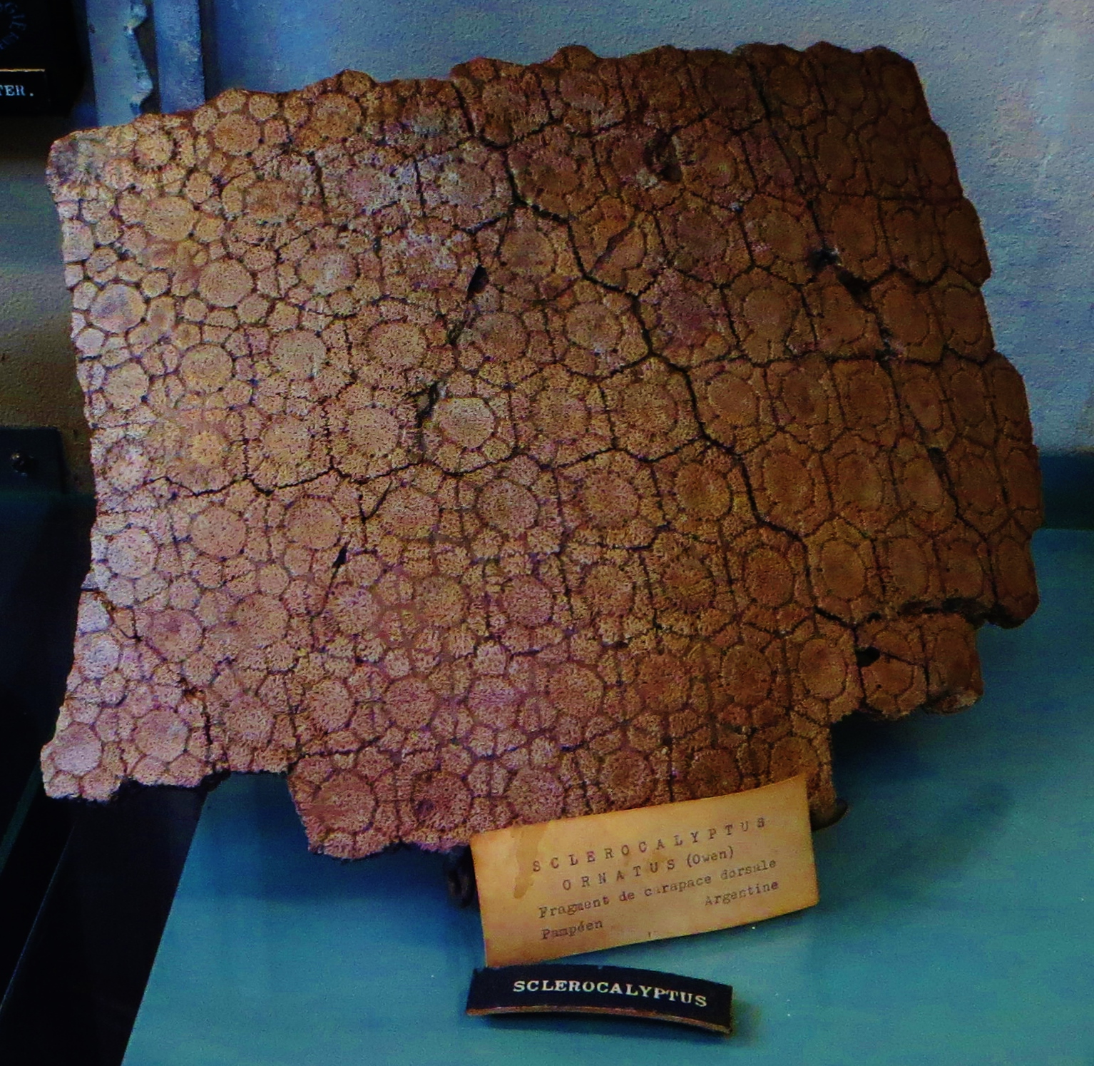 Fossil of Sclerocalyptus, an extinct mammal - Took the photo at Musee d'Histoire Naturelle, Paris